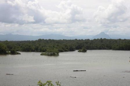 Danau yang terletak di desa padang Betuah Kecamatan Pondok Kelapa Bengkulu tengah